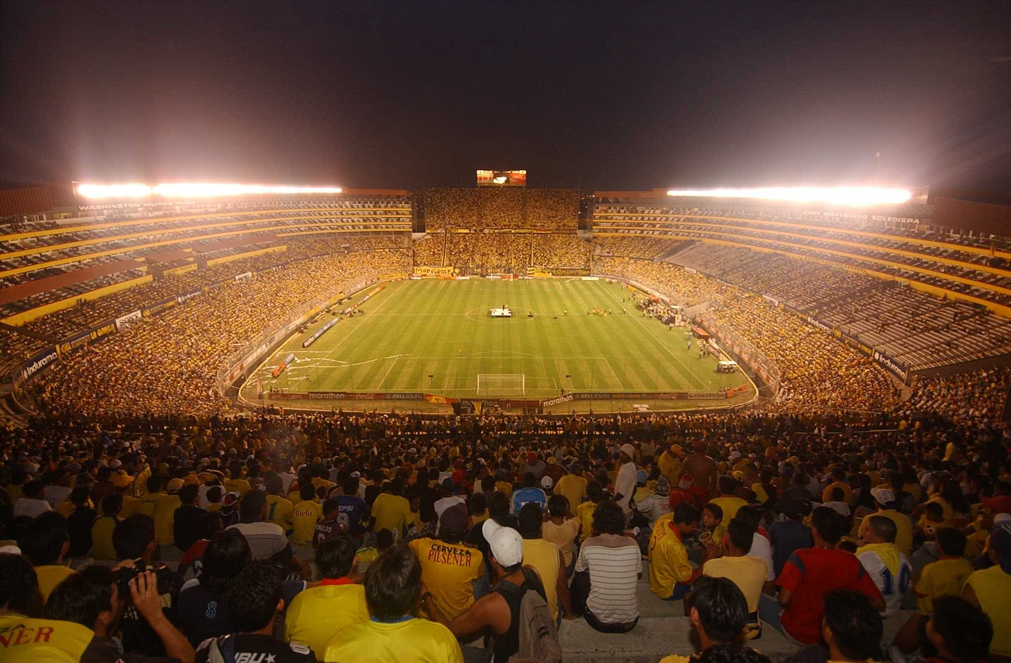 Estadio Monumental Isidro Romero Carbo, Guayaquil - Ecuador.